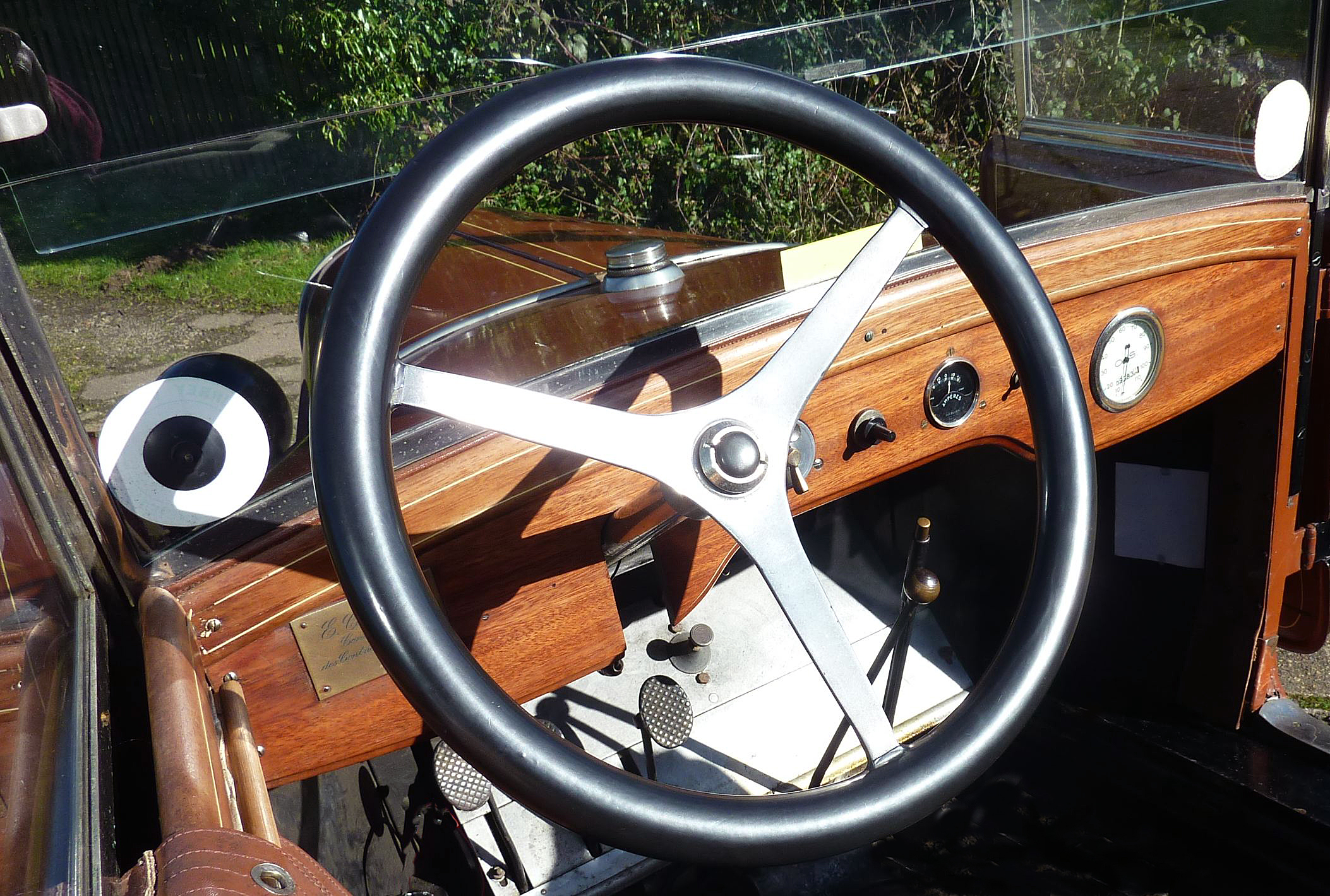 Tableau de bord de Citroen 5HP TL Cabriolet en acajou